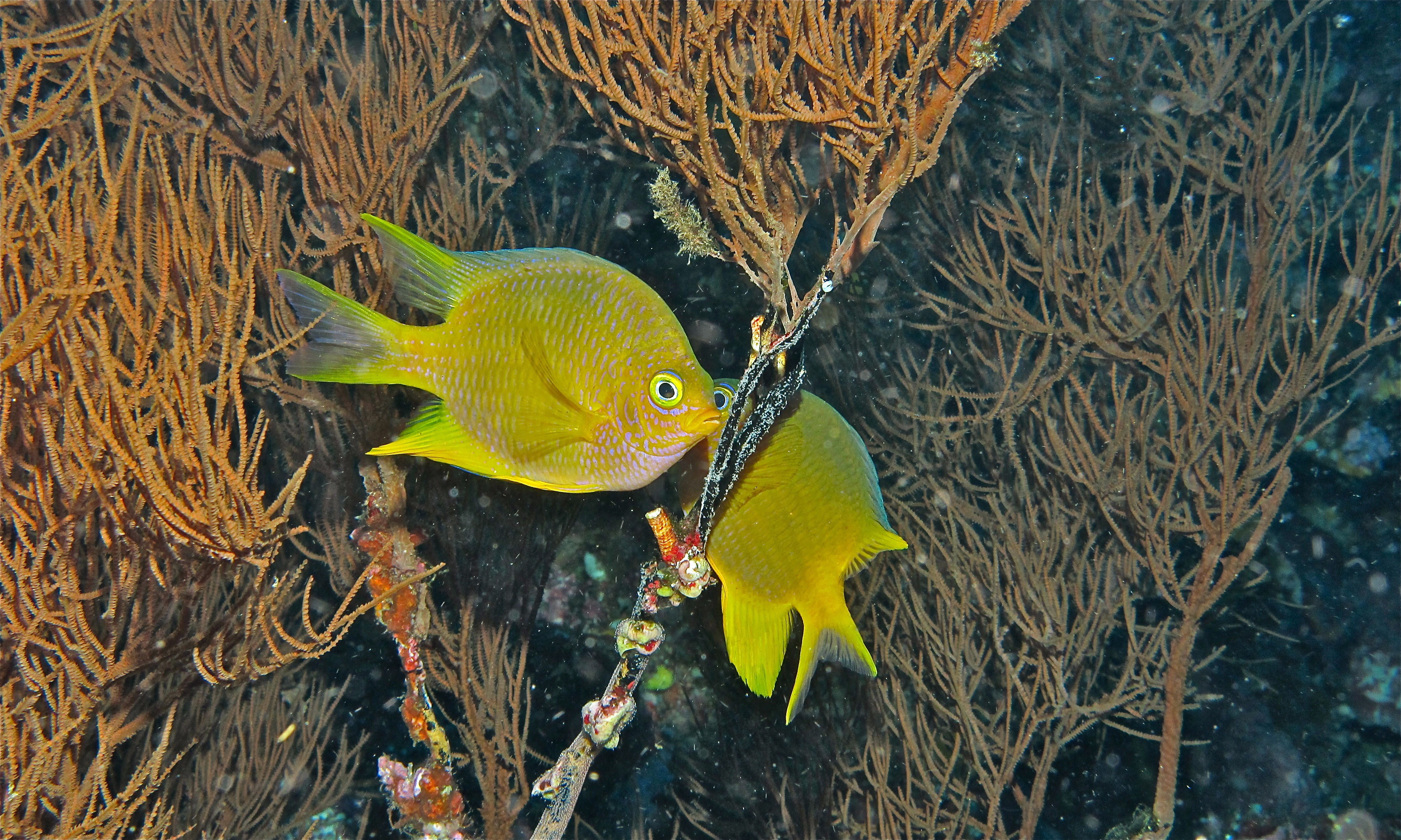 Mandoline, Bunaken Island, Sulawesi, INDONESIA